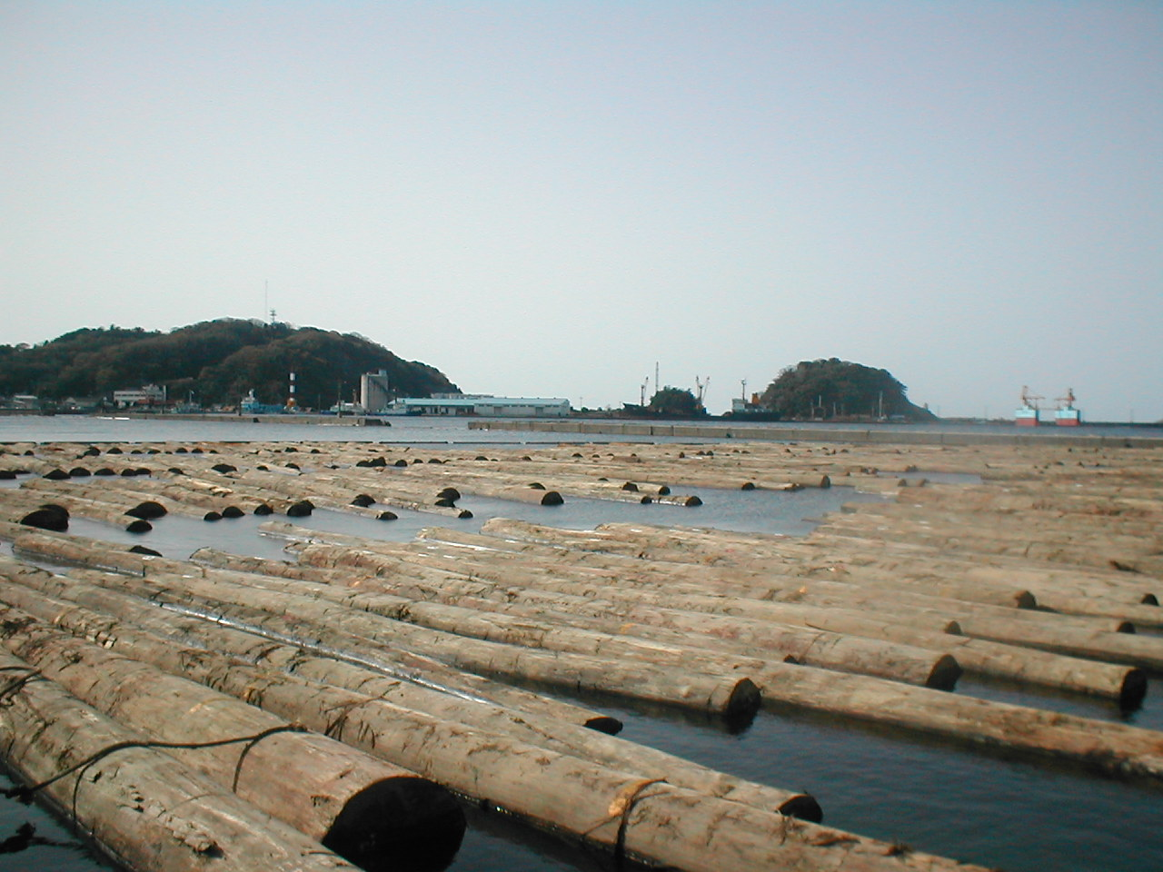 浜田港木材置場(Hamada Port wood depot)